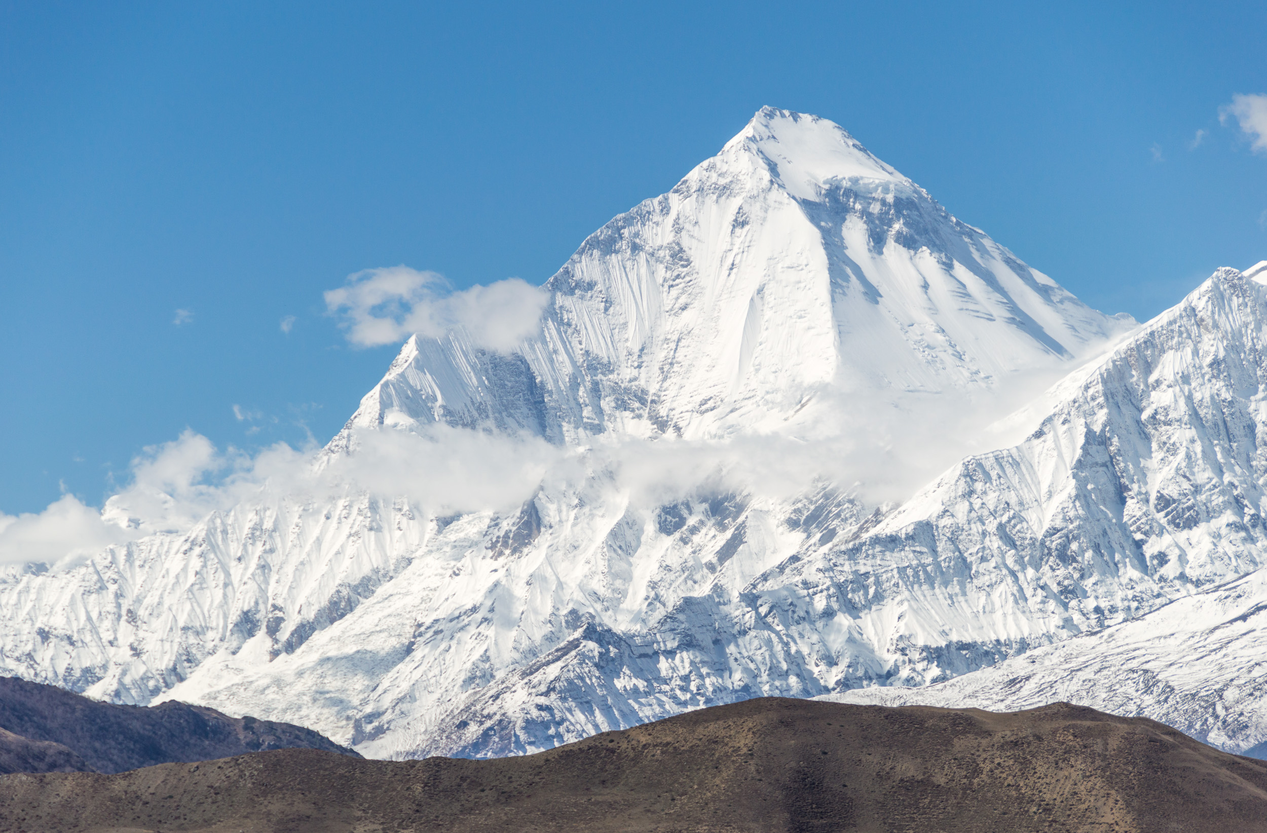 Dhaulagiri (8167 m) / Annapurna Circuit, Nepal